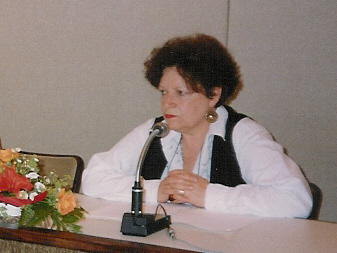 La escritora argentina Luisa Futoransky (* 1939) en un simposio en Eichstaett, Alemania, en mayo de 1993